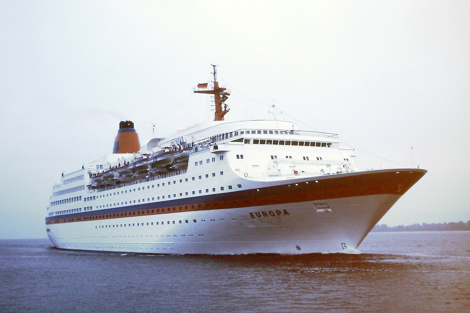 MS Europa im Hafen von Travemünde IMO Number: 7822457 MMSI Number: 256208000 Callsign: 9HOF8 Length: 200 m Beam: 28 m